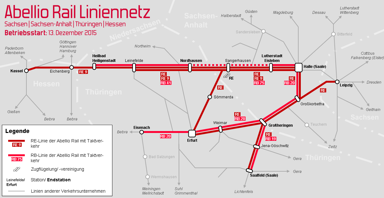 Liniennetz der Abellio Rail Mitteldeutschland in Thüringen ab Dezember 2015